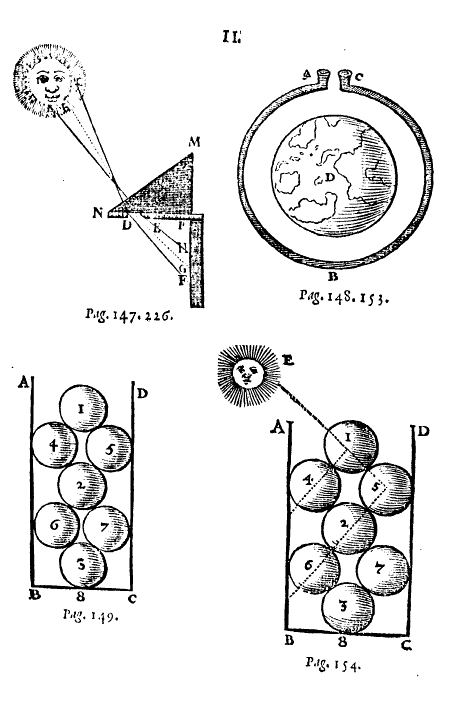 Im Lichte der Erkenntnis: eine aus lauter kleinen Kügelchen zusammengesetzte seelenlose Welt, Renati Descartes Epistolae (Londini: 1668), Bd. 1, S. 147 Illustration zu Seite 147: René Descartes, Renati Descartes Epistolae partim ab auctore Latino sermone conscriptae, partim ex Gallico translatae in quibus omnis generis quaestiones philosophicae tractantur, & explicantur plurimae difficultates quae in reliquis eius operibus occurrunt. (Londini: Joh. Dunmore, & Octaviani Pulleyn, 1668), Teil 1 Eine Übersetzung des Titel würde lauten: Die Briefe René Descartes, in denen alle Arten von philosophischen Fragen behandelt und eine Vielzahl von Problemen erklärt werden, die in seinen zurückliegenden Werken auftauchten, zum Teil vom Autor aus den lateinischen Originalen abgeschrieben, zum Teil aus dem Französischen übersetzt (London: Joh. Dunmore, & Octaviani Pulleyn, 1668).